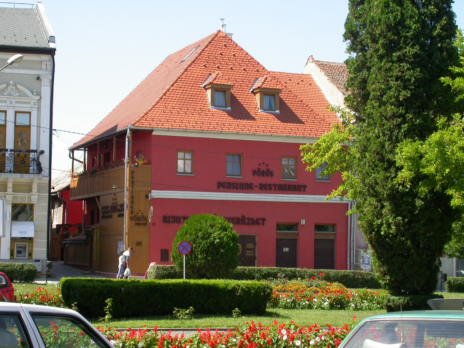 Casa Roșie (Veres), înc. sec. XVIII